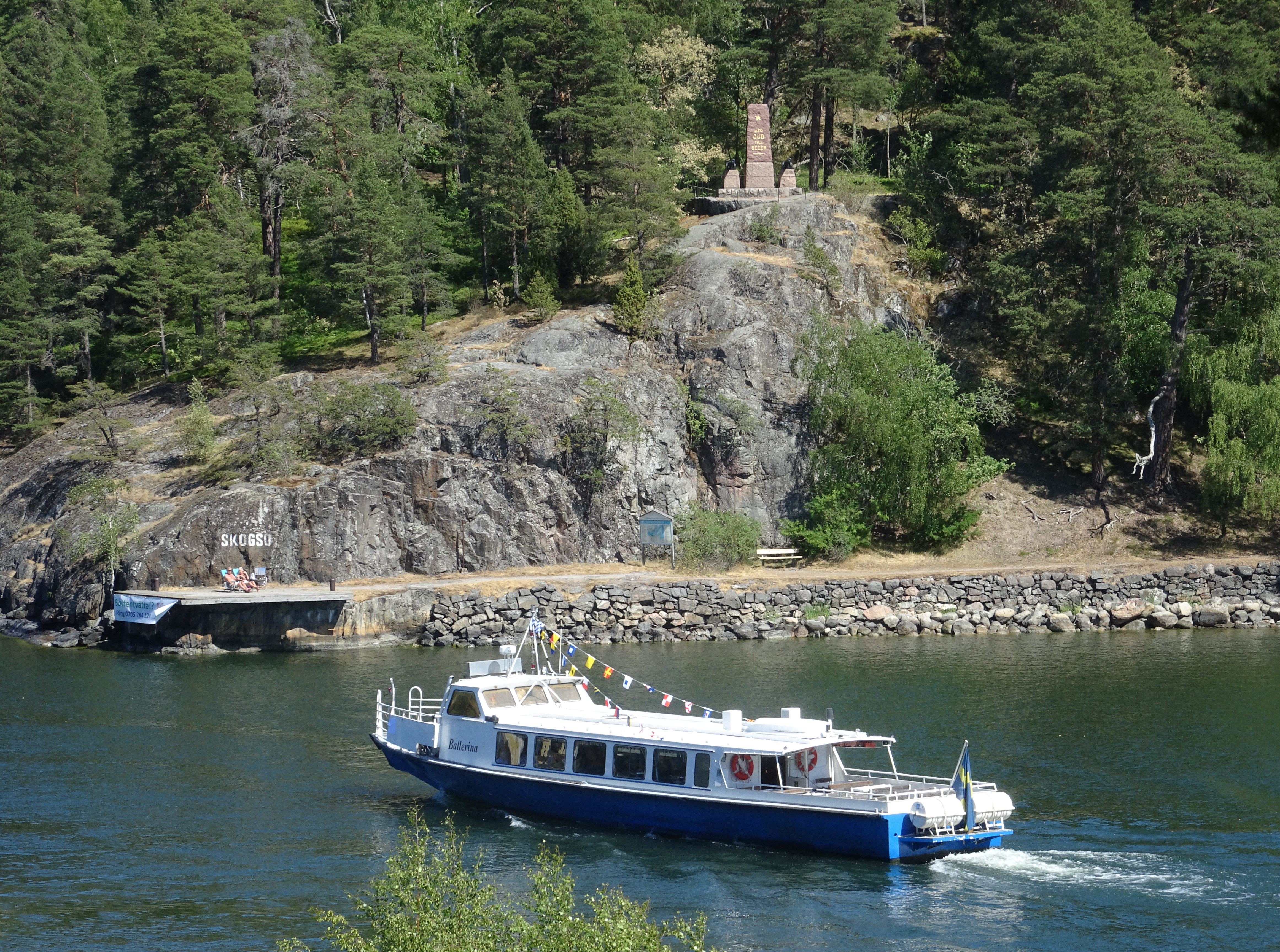 Skogsömonumentet, Skogsön